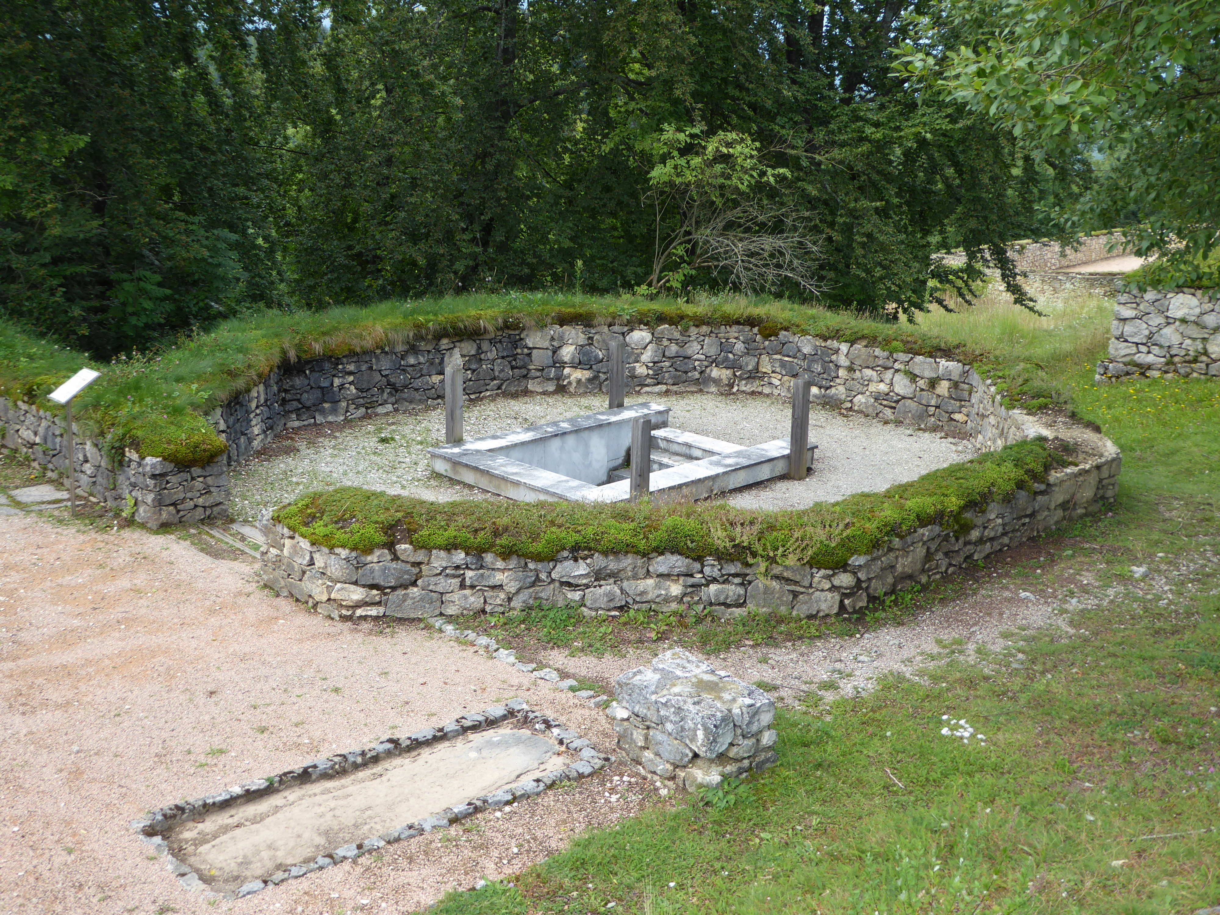 Hemmaberg, Globasnitz, Kärnten - Östliche Doppelkirche: Baptisterium